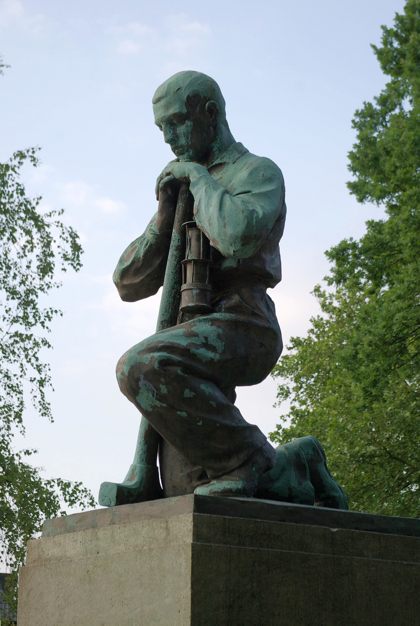 Ein Kumpel, Teil des Denkmals, das in Erinnerung an das schwere Grubenunglück in der Zeche Radbod in Bockum-Hövel errichtet wurde.